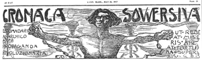 Logo du journal anarchiste Cronaca Sovversiva